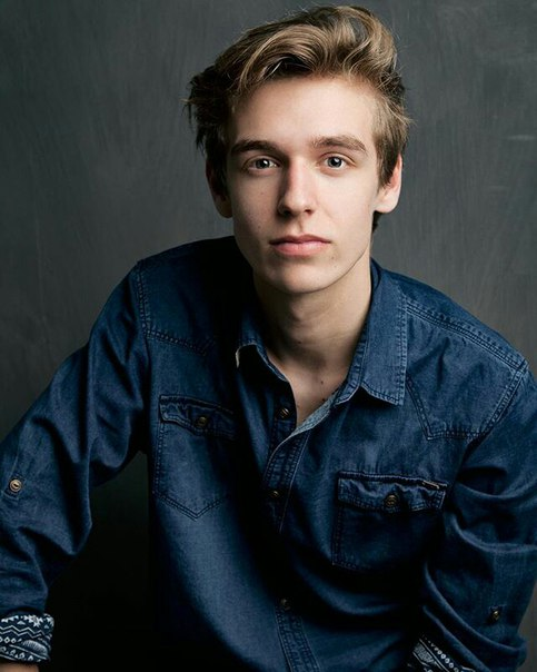 Ridder van Kooten